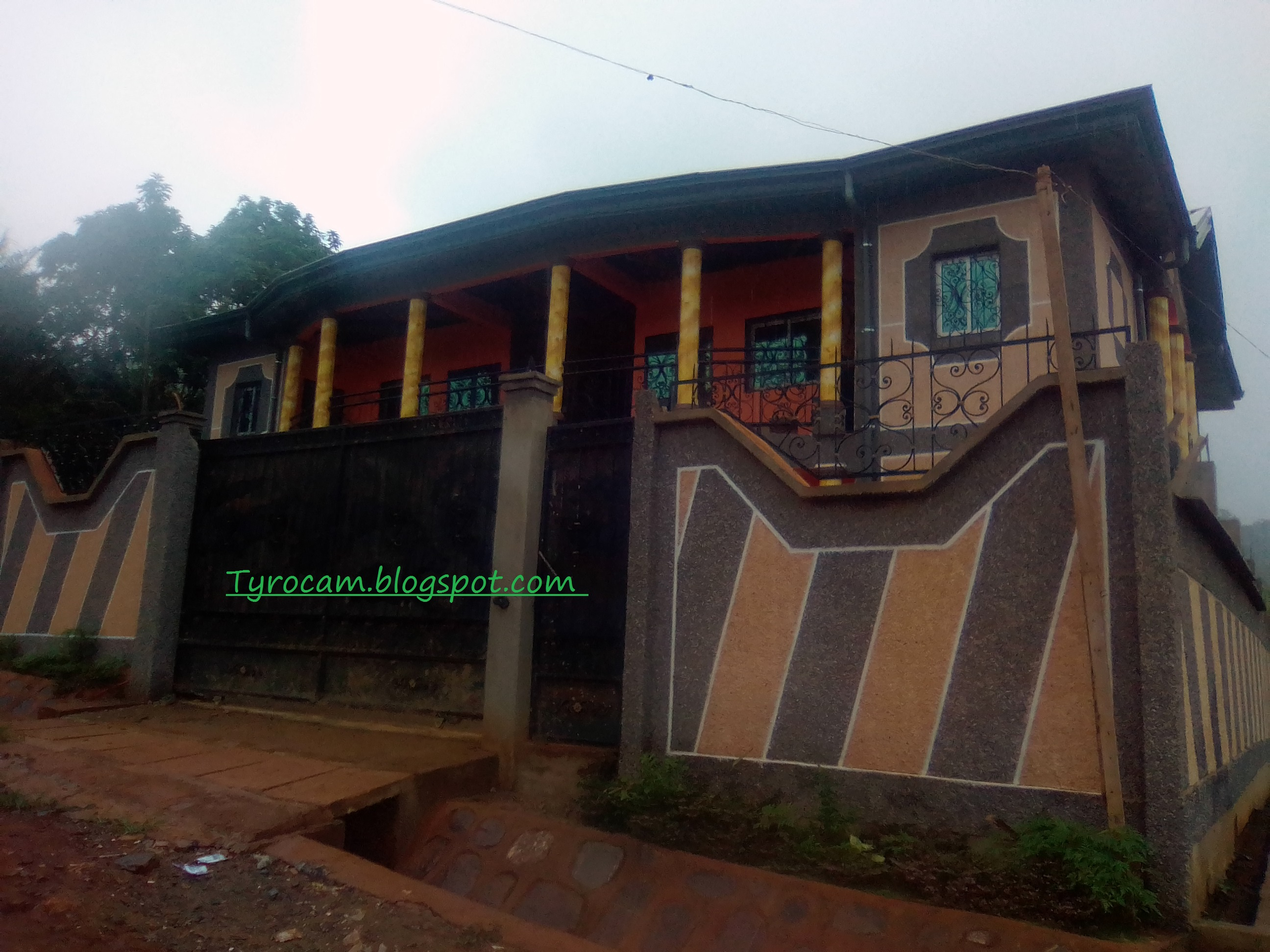 mosaïques de grains tyrocam